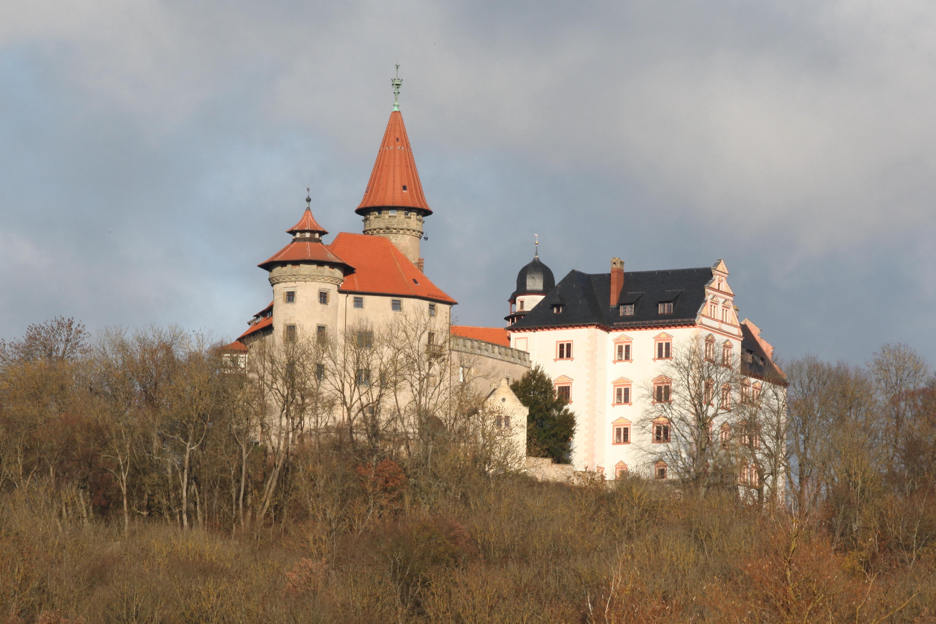 Veste Heldburg